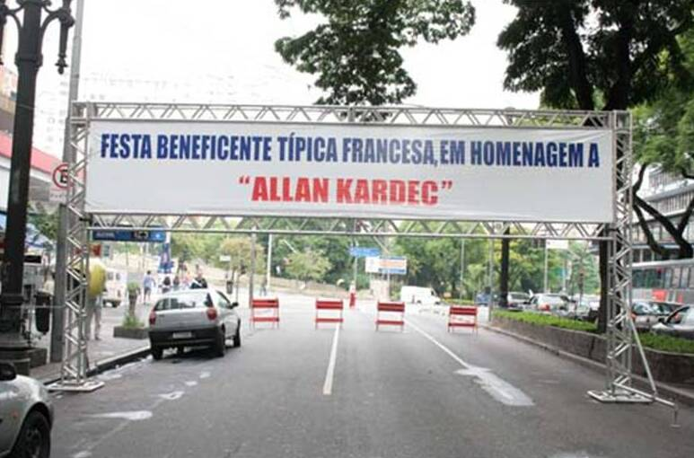 Les rues de Sao Paulo décorées aux couleurs françaises pour la fête de charité "Allan Kardec", en 2008.